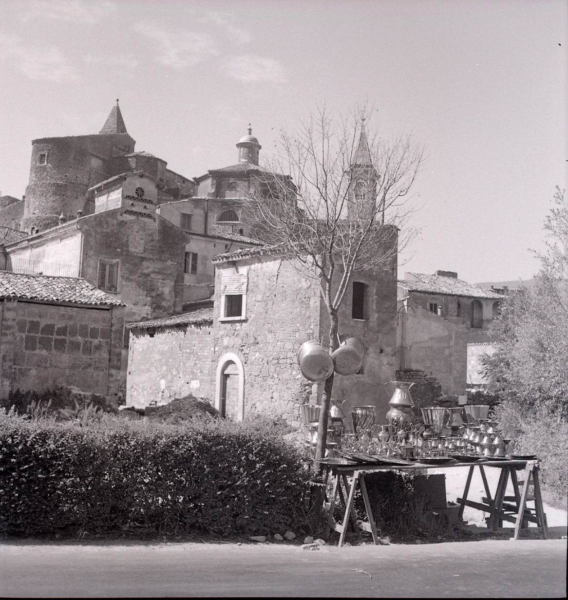 Servizio fotografico : Popoli, 1965 / Paolo Monti. - Buste: 21, Fototipi: 21 : Negativo b/n, gelatina bromuro d'argento/ pellicola ; 6x6. - ((Serie costituita da 21 negativi identificati con i nn.: 10582-10602. Numerazione parallela: 132-152. Sulla busta R10582 manoscritto: "Popoli". La suddetta serie è contenuta nella scatola identificata con la numerazione R10444/10602. Sul coperchio iscrizione manoscritta a pennarello: "Isole Tremiti".